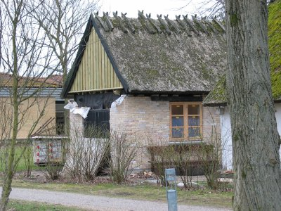 Museet for Kajs Avis ved Værløse Museum